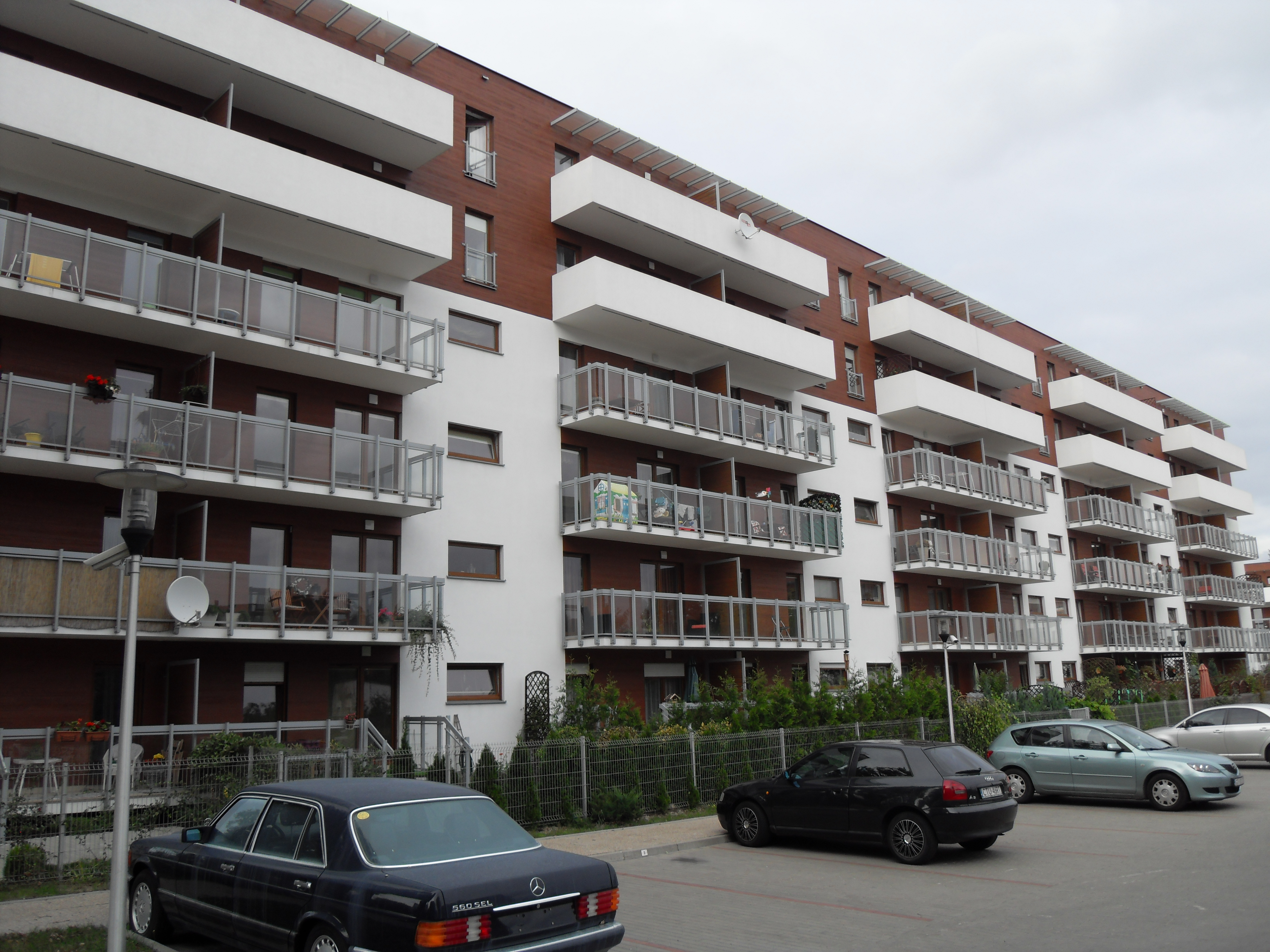 Gdańsk Przymorze. Osiedle "Arkońska" (zbudowane przez "Inpro"), ul. Śląska.